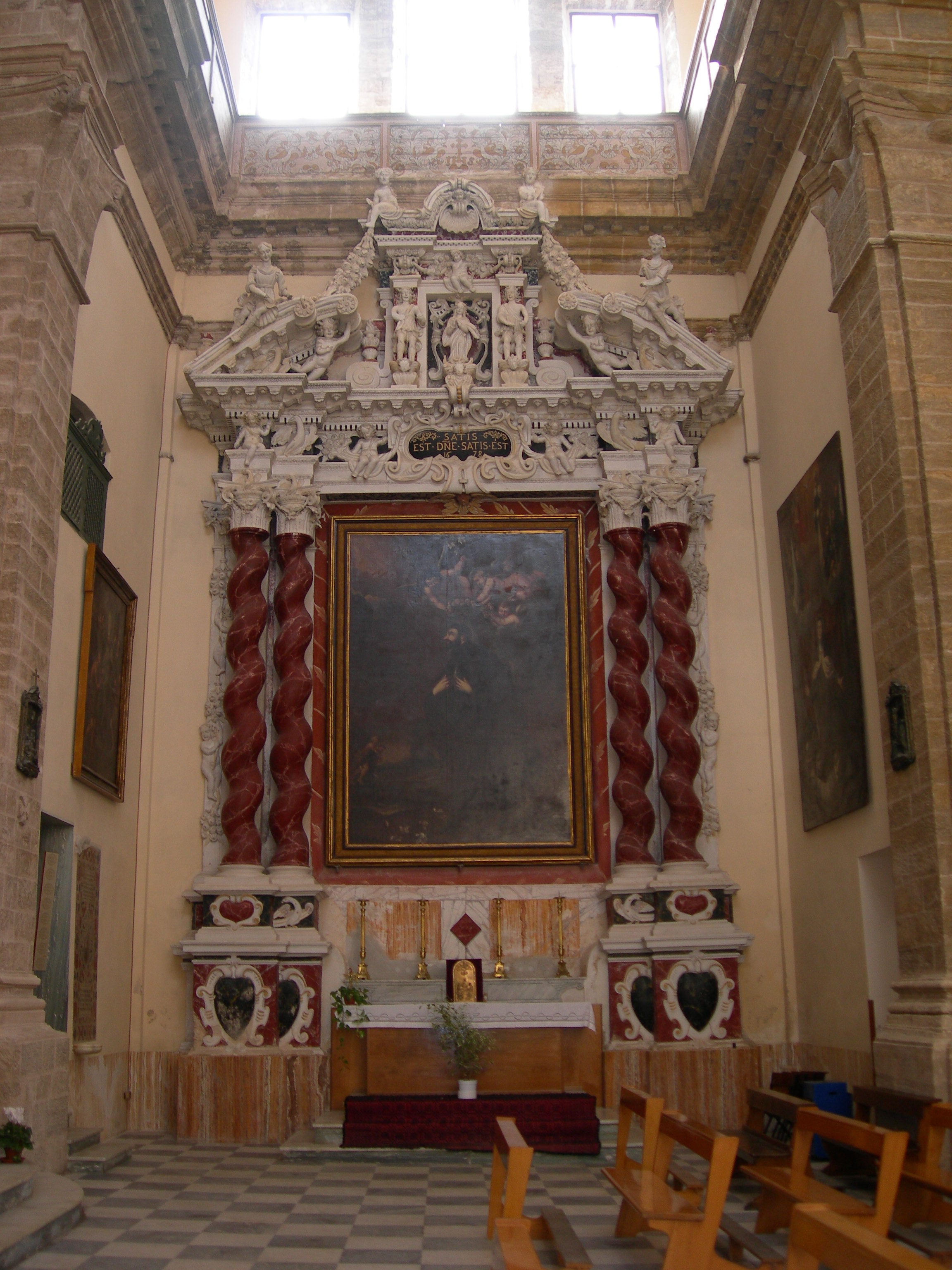 Altare laterale destro del transetto, chiesa di San Michele, Alghero, Italy.